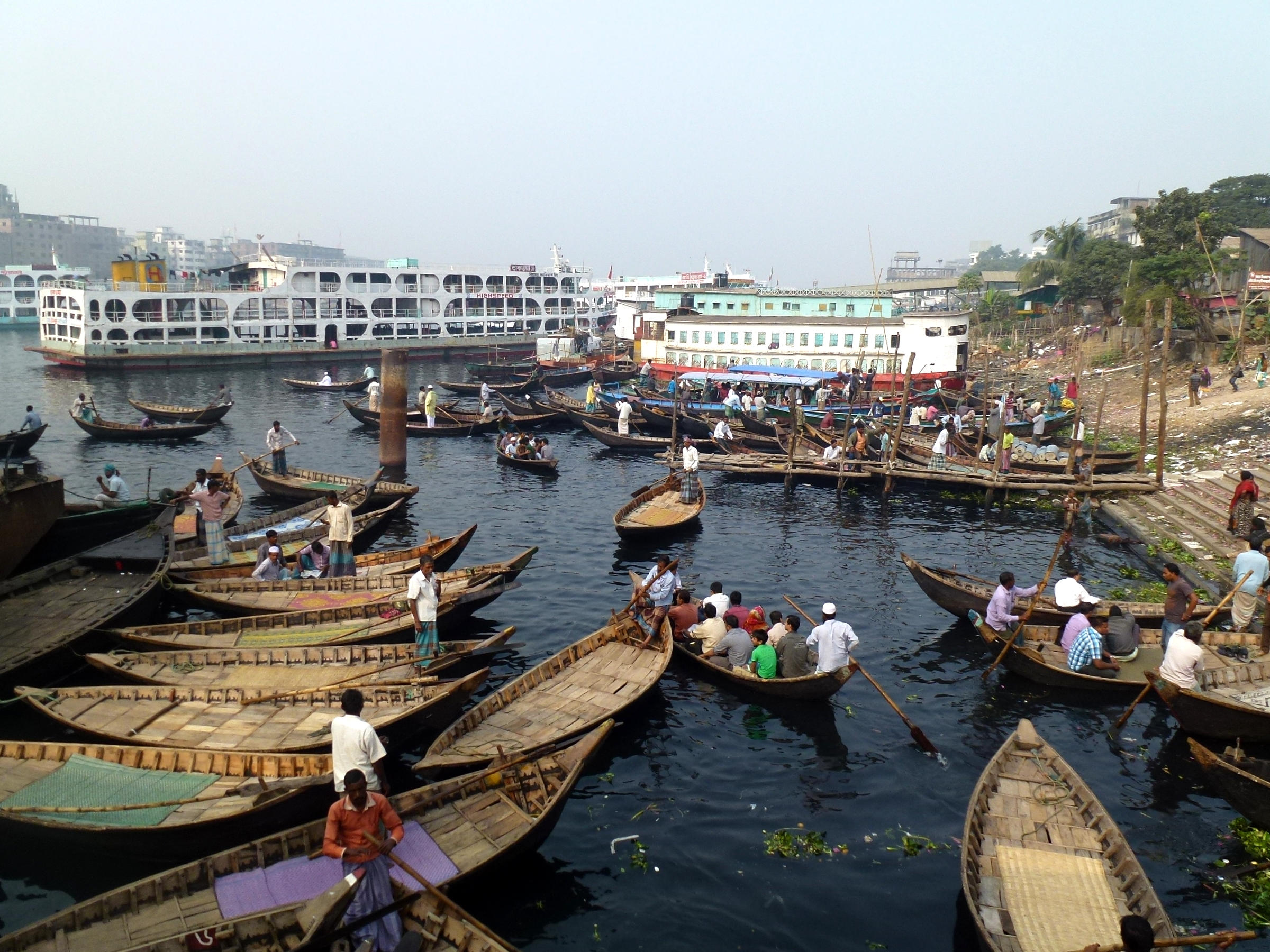 Sadarghat Old Dhaka Bangladesh